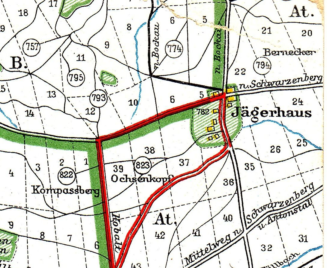 Der im Wald liegende Ochsenkopf ragt mit seinen 823 m über die östlich liegende offene Fäche der Siedlung Jägerhaus praktisch nicht hervor. Die rot markierten Wege sind Wanderwege zum Auersberg.